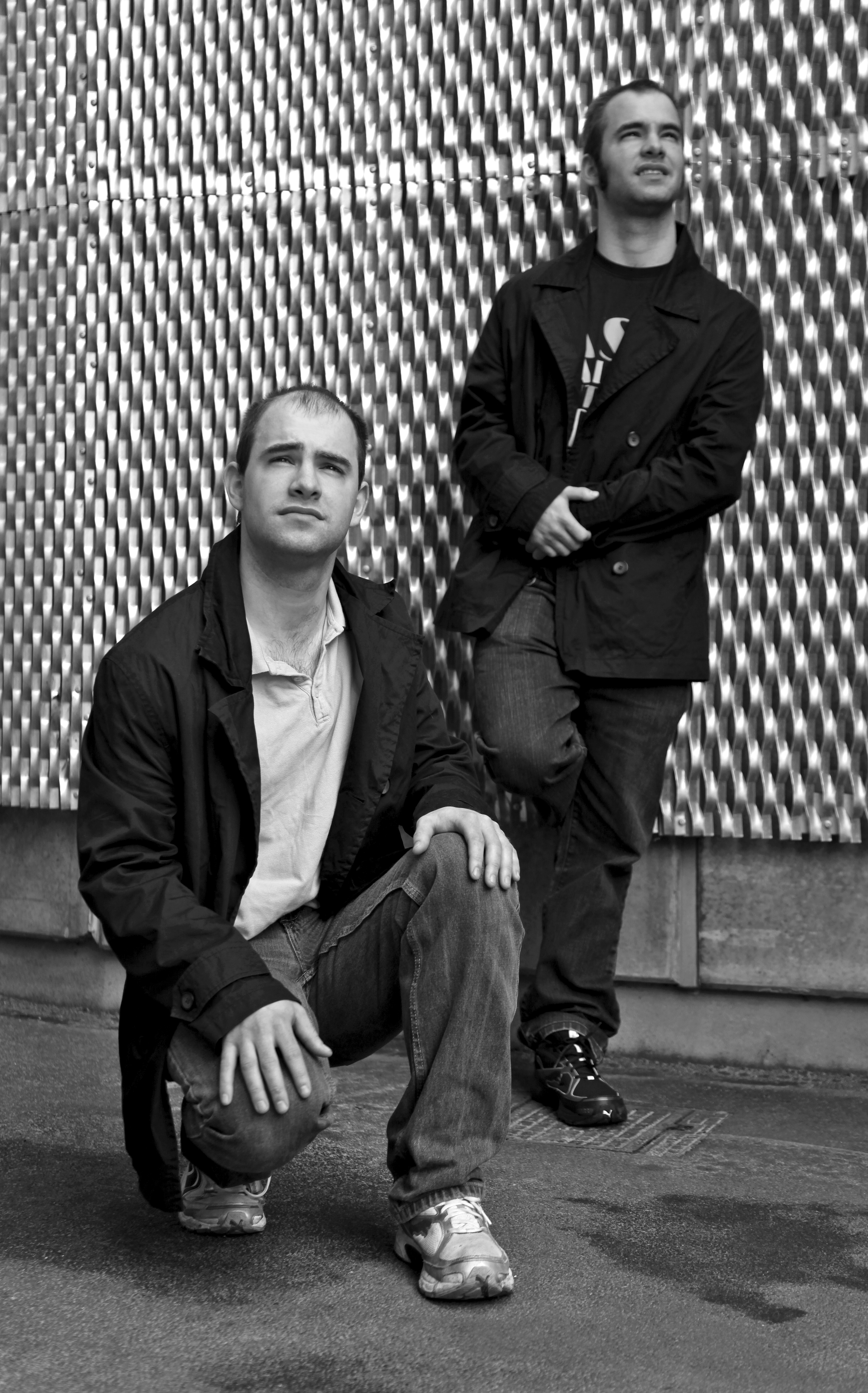 EFE